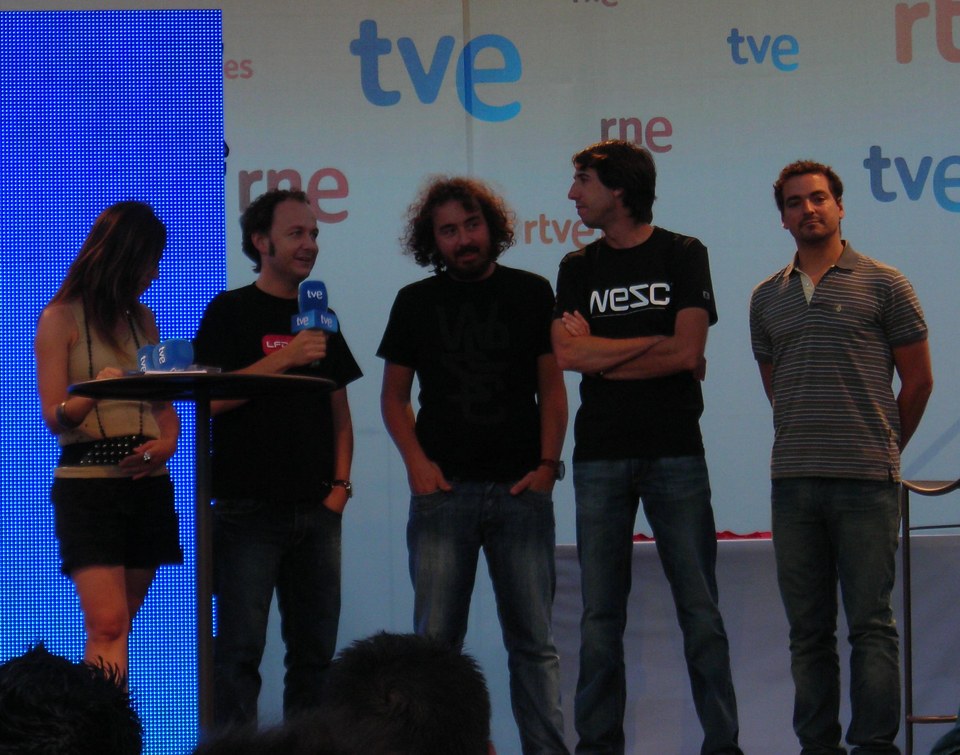 La Oreja de Van Gogh en el set de RTVE de la villa "Club Selección", horas antes del partido de fútbol España-Bosnia, de clasificación para el Mundial 2010.